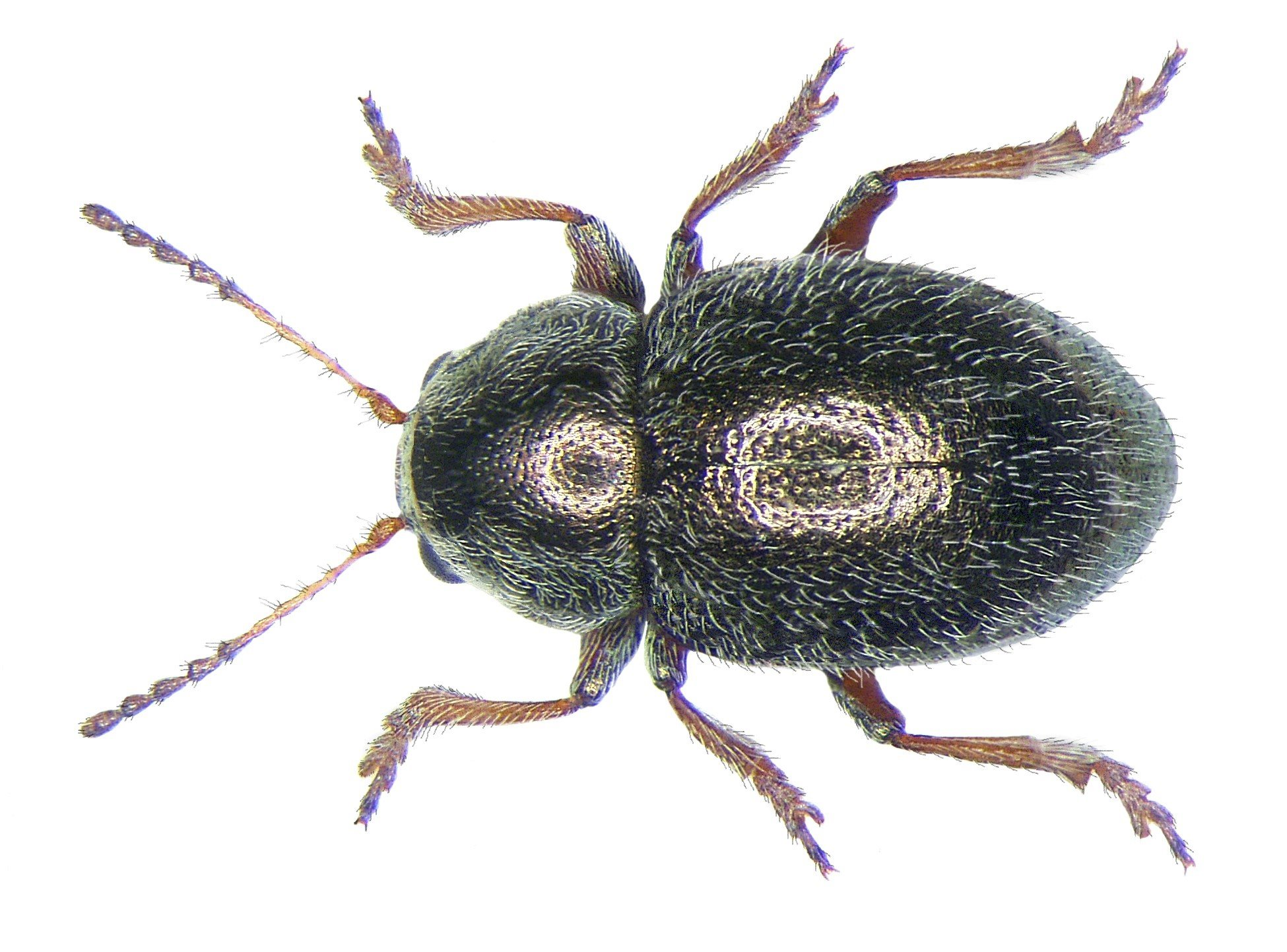 Colaspidea oblonga Blanchard, 1855 Familie: Chrysomelidae Grösse: 3 mm Verbreitung: mediterran Fundort: Italien, Prov. Grosseto, Principina a Mare leg. det. G.Rößler, 1993 Foto: U.Schmidt, 2007